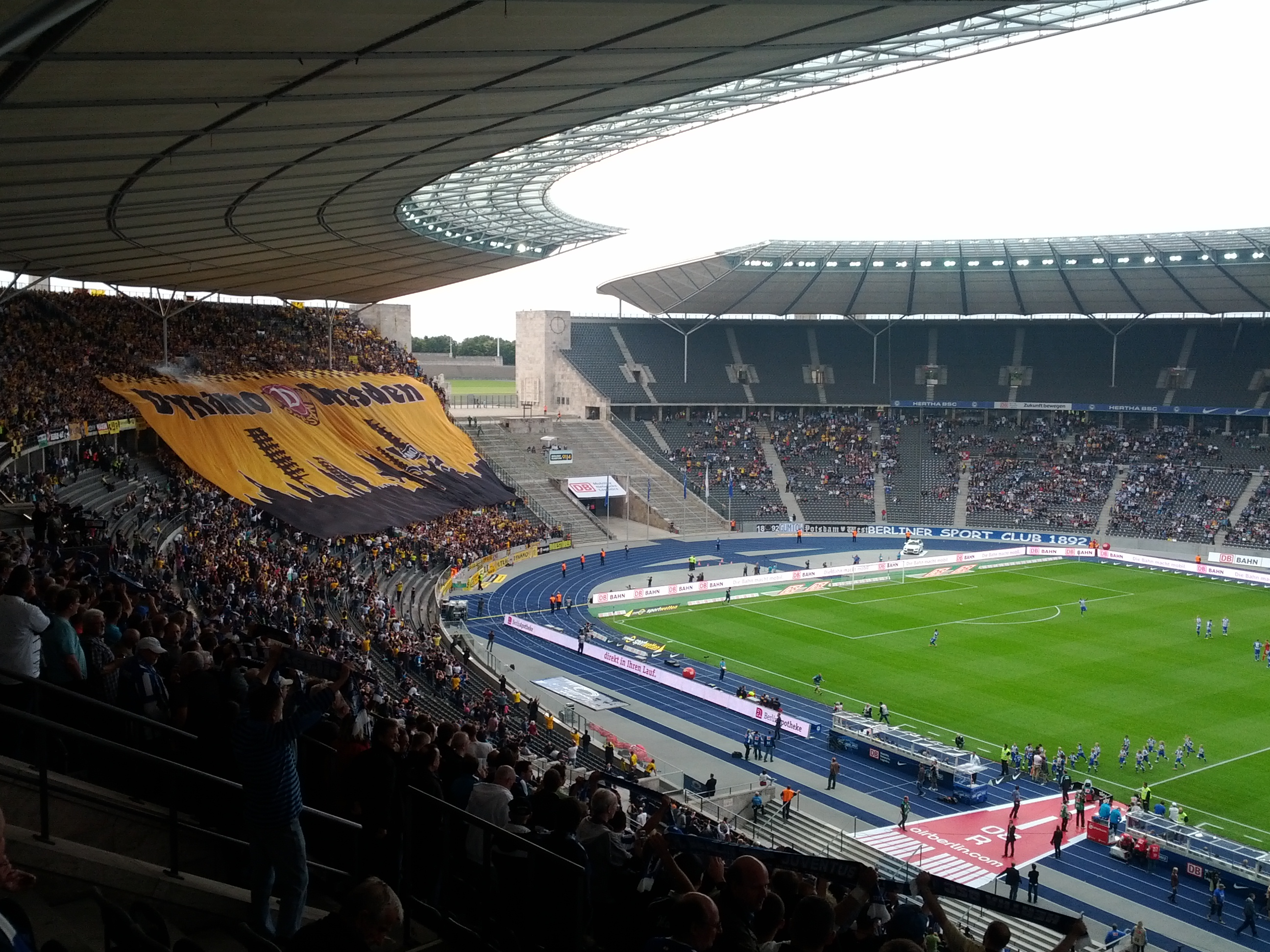 Fanchoreographie von Dynamo Dresden im Olympiastadion in Berlin gegen Hertha BSC Berlin 2012/2013